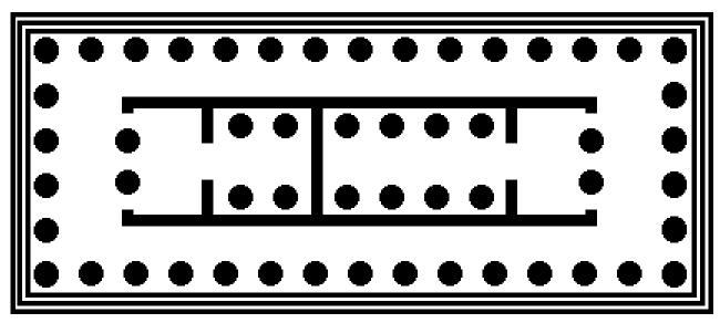 Reconstructie van grondplan van de 6de eeuwse Apollotempel. Gemaakt door David Degelin.